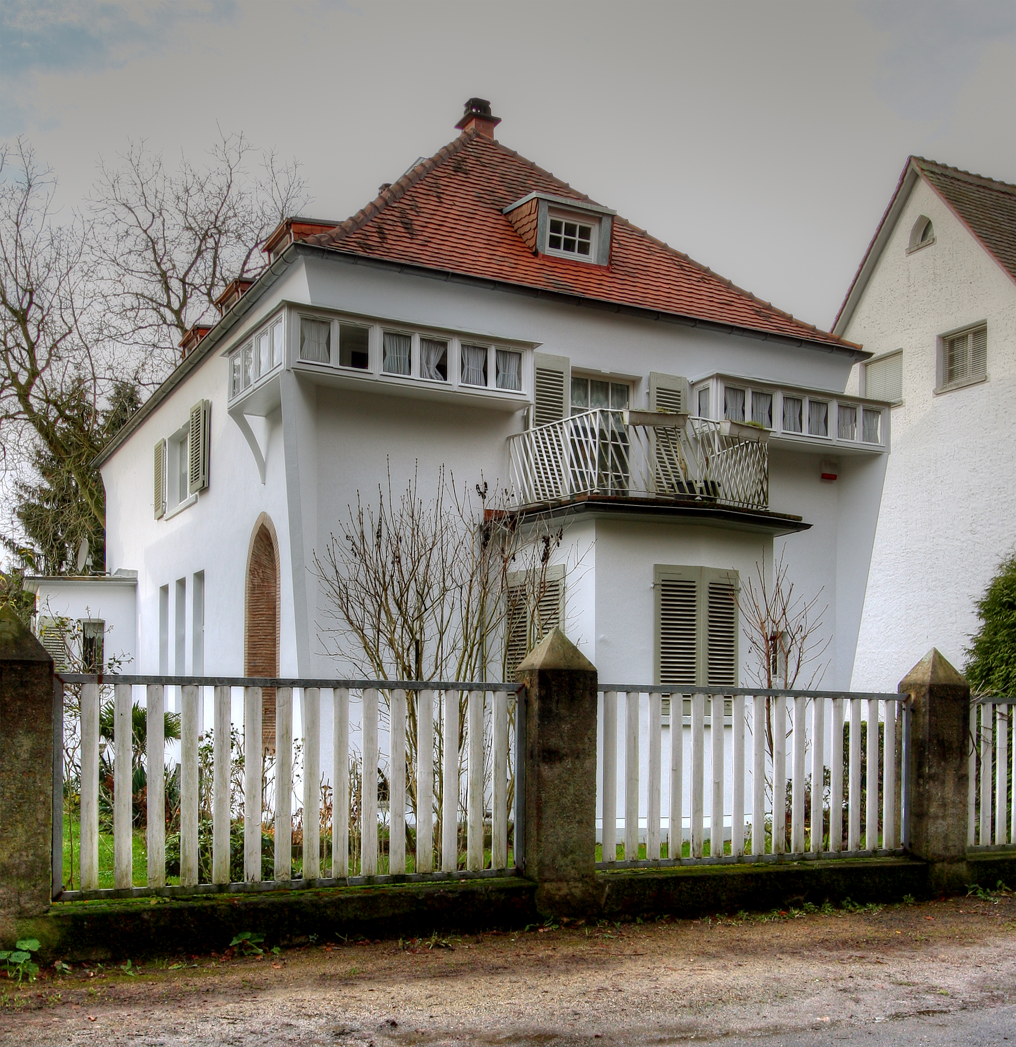 Wohnhaus in Offenbach am Main, Am Waldpark. Umbau 1924-26 nach Entwürfen des Architekten Dominikus Böhm